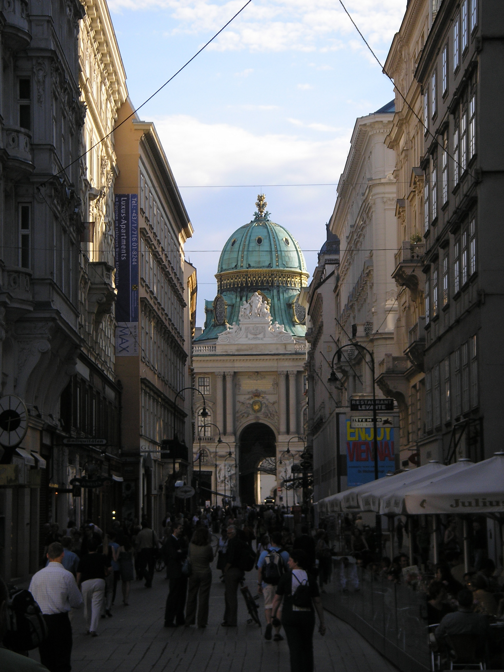 The Kohlmarkt street in Vienna.